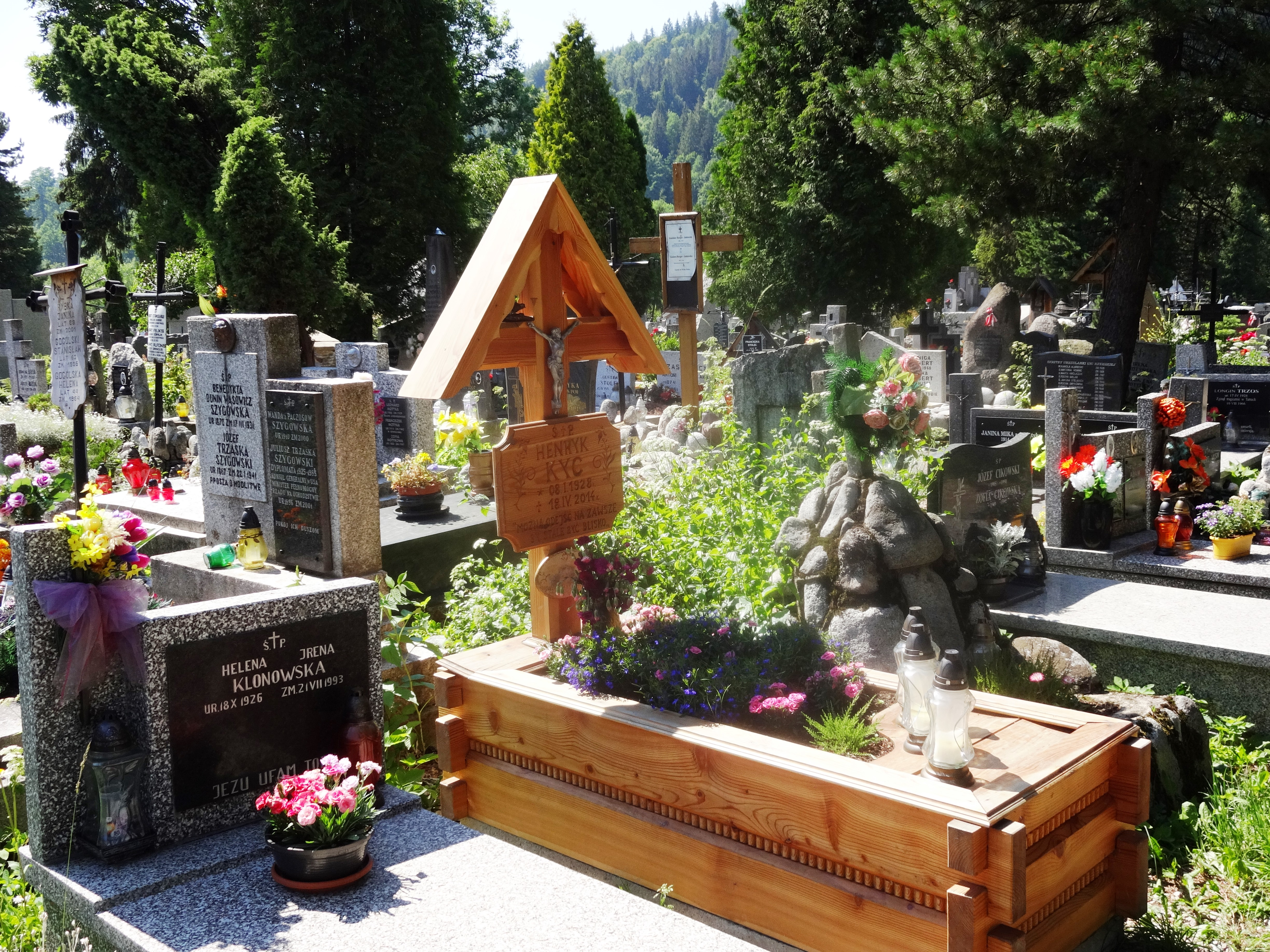 New Cemetery in Zakopane